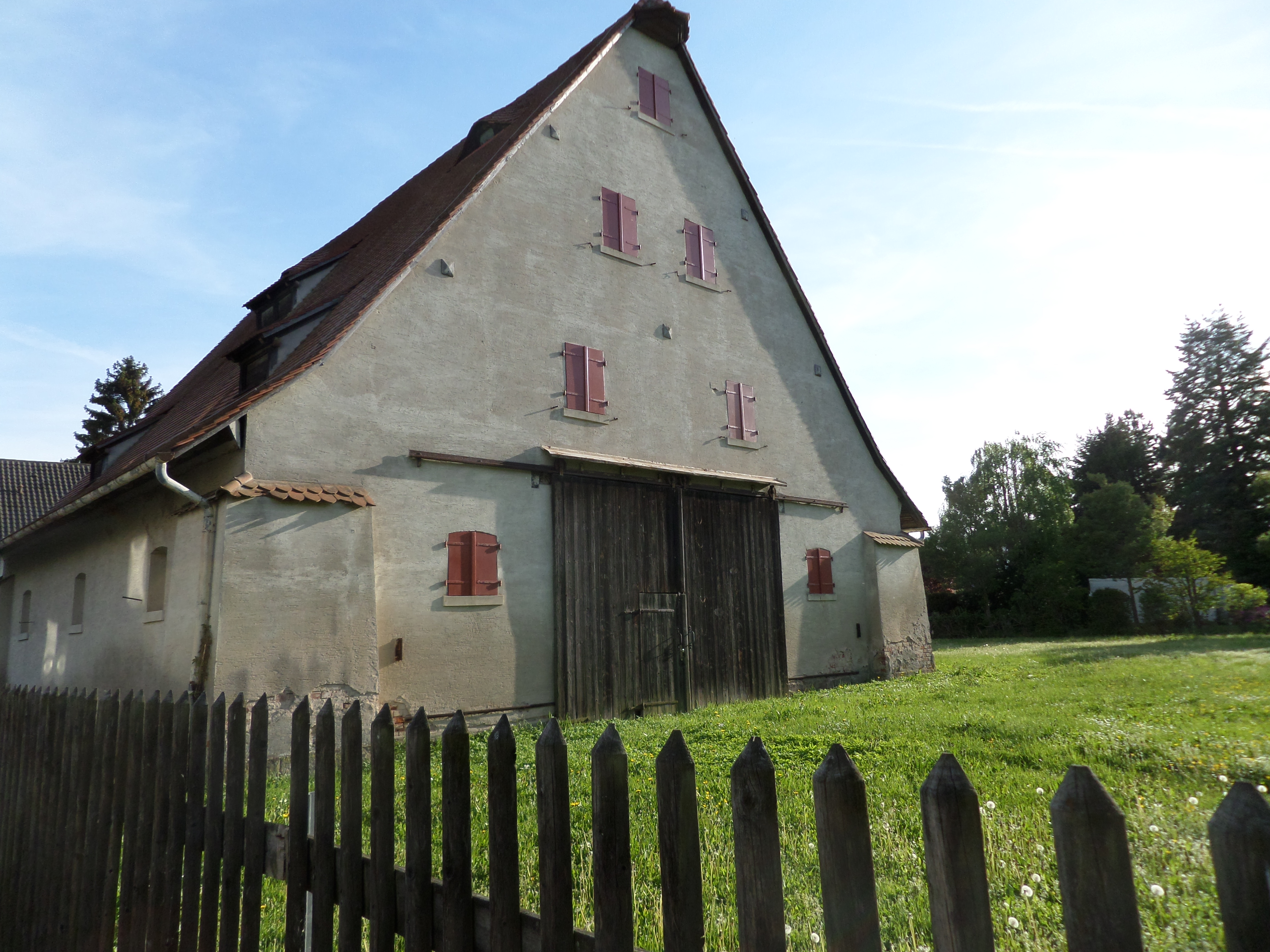 Spitalhof 3a/3b - Hofanlage - Bauernhaus, erdgeschossiger, traufständiger Sandsteinquaderbau mit Satteldach und Fachwerkgiebel an Ostseite, im Kern 18. Jahrhundert - Stallgebäude, erdgeschossiger Sandsteinquaderbau mit Satteldach, bez. 1752 - Scheune, verputzter Ziegelbau mit Steilsatteldach und Schopf, bez. 1900. - D-5-64-000-1905